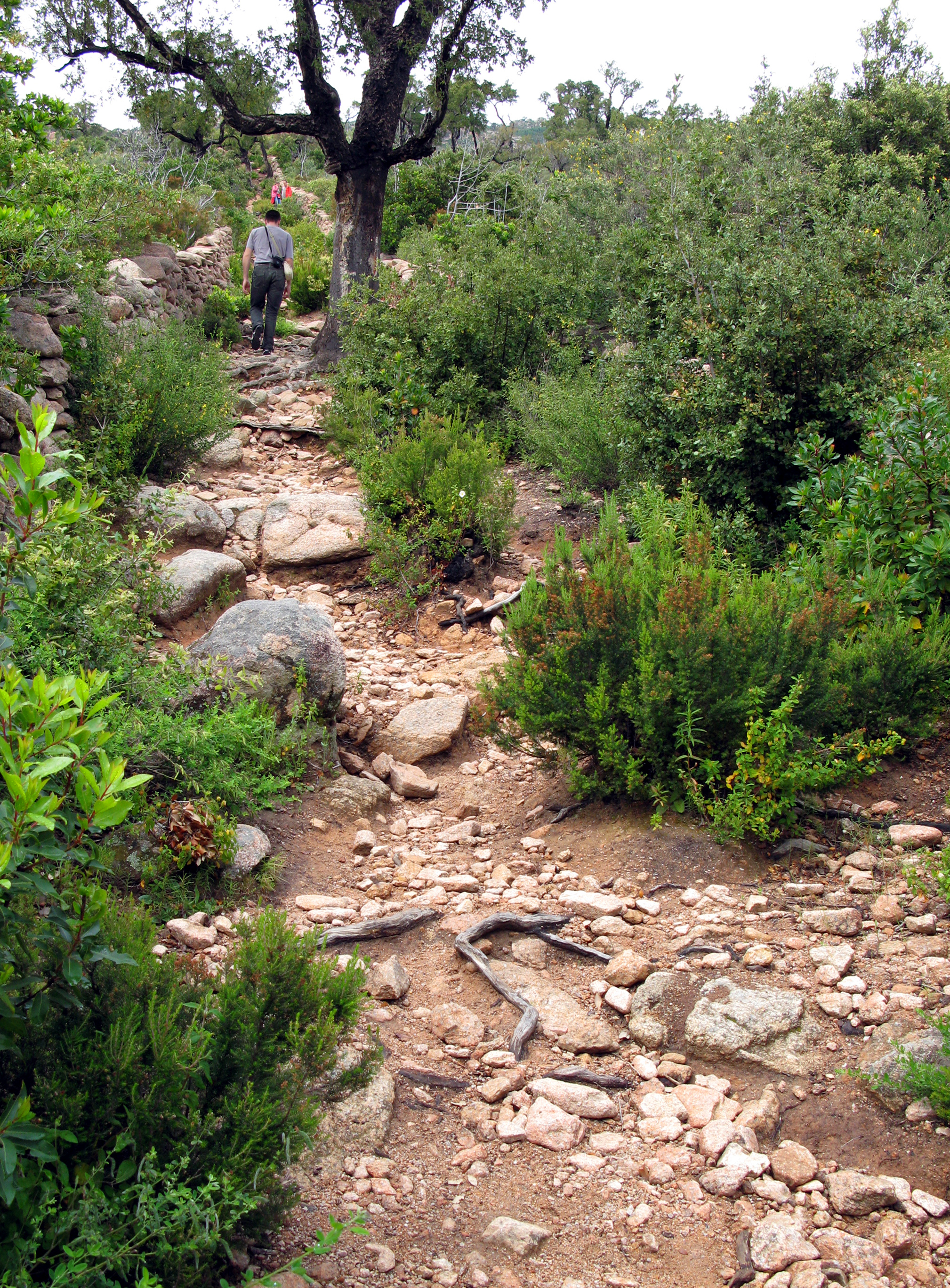 Araghju (Corse-du-Sud, France) - Début du sentier montant au "castellu" préhistorique.